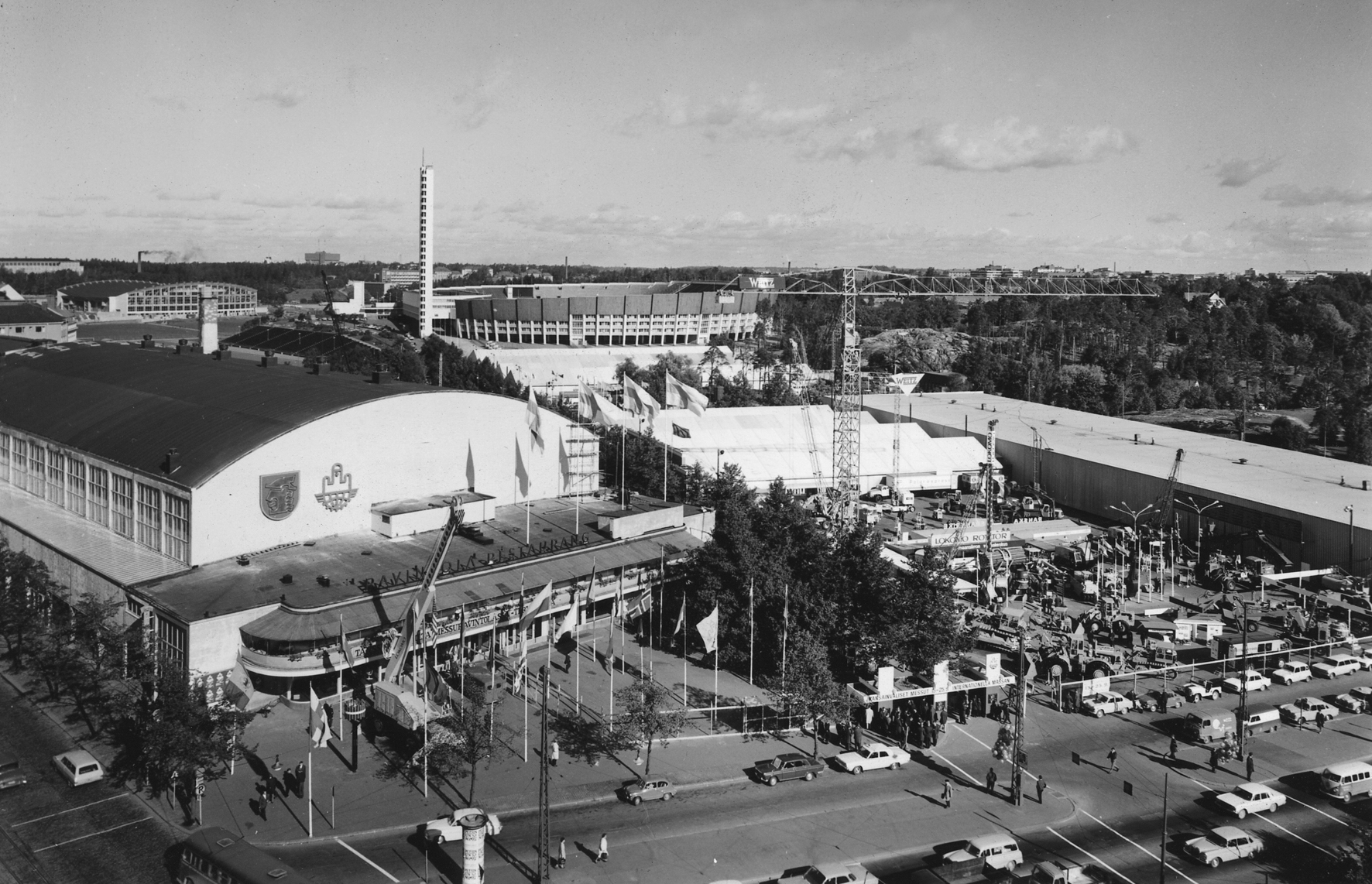 Messuhalli Mannerheimintiellä Töölössä